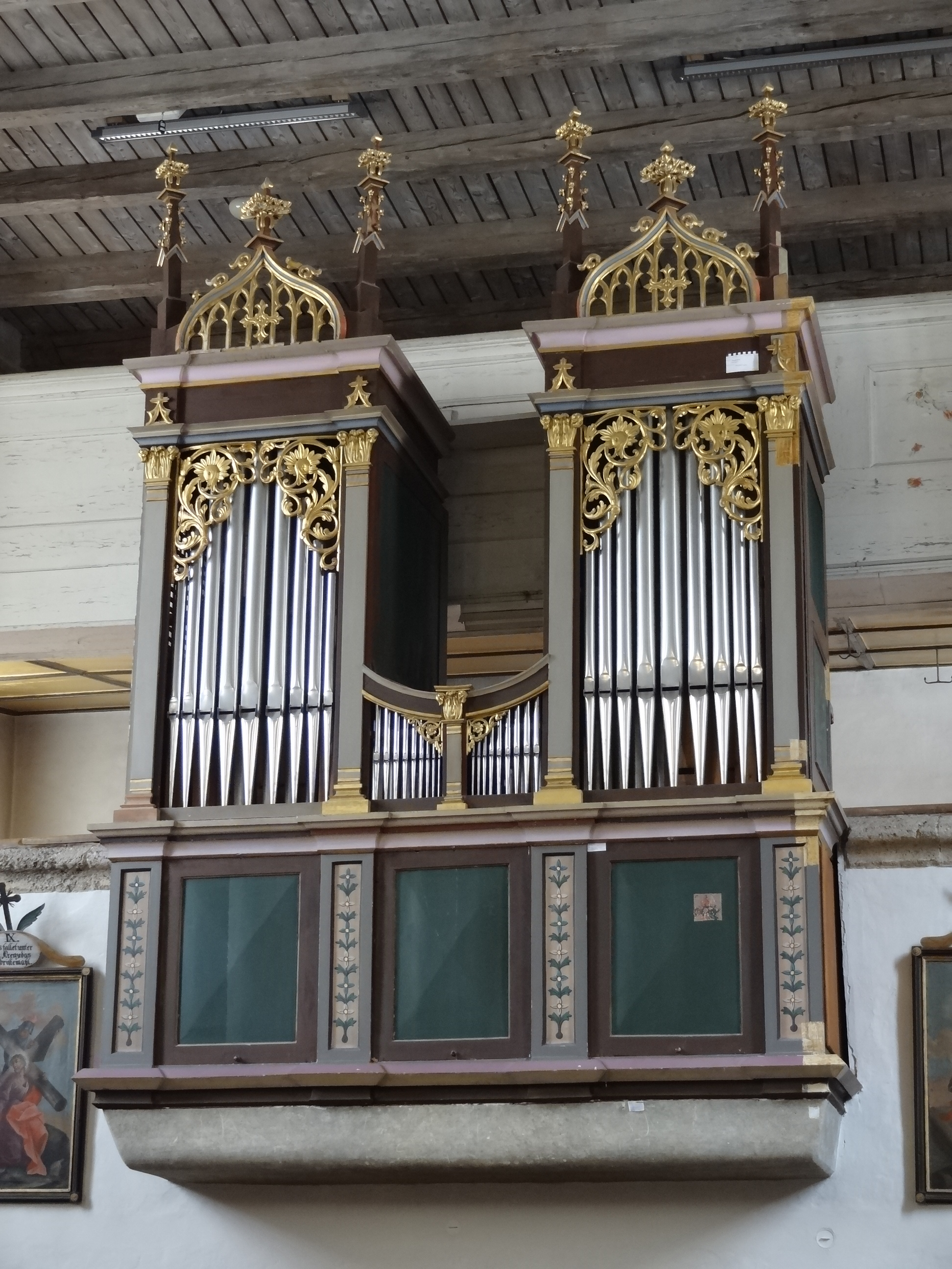 Saints Peter and Paul church (Filzmoos) organ